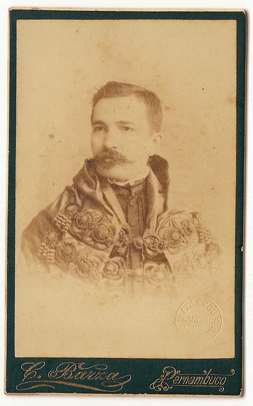 Clóvis_Bevilaqua, catedátrico de Legislação Comparada, Faculdade de Direito do Recife (1891-1895)